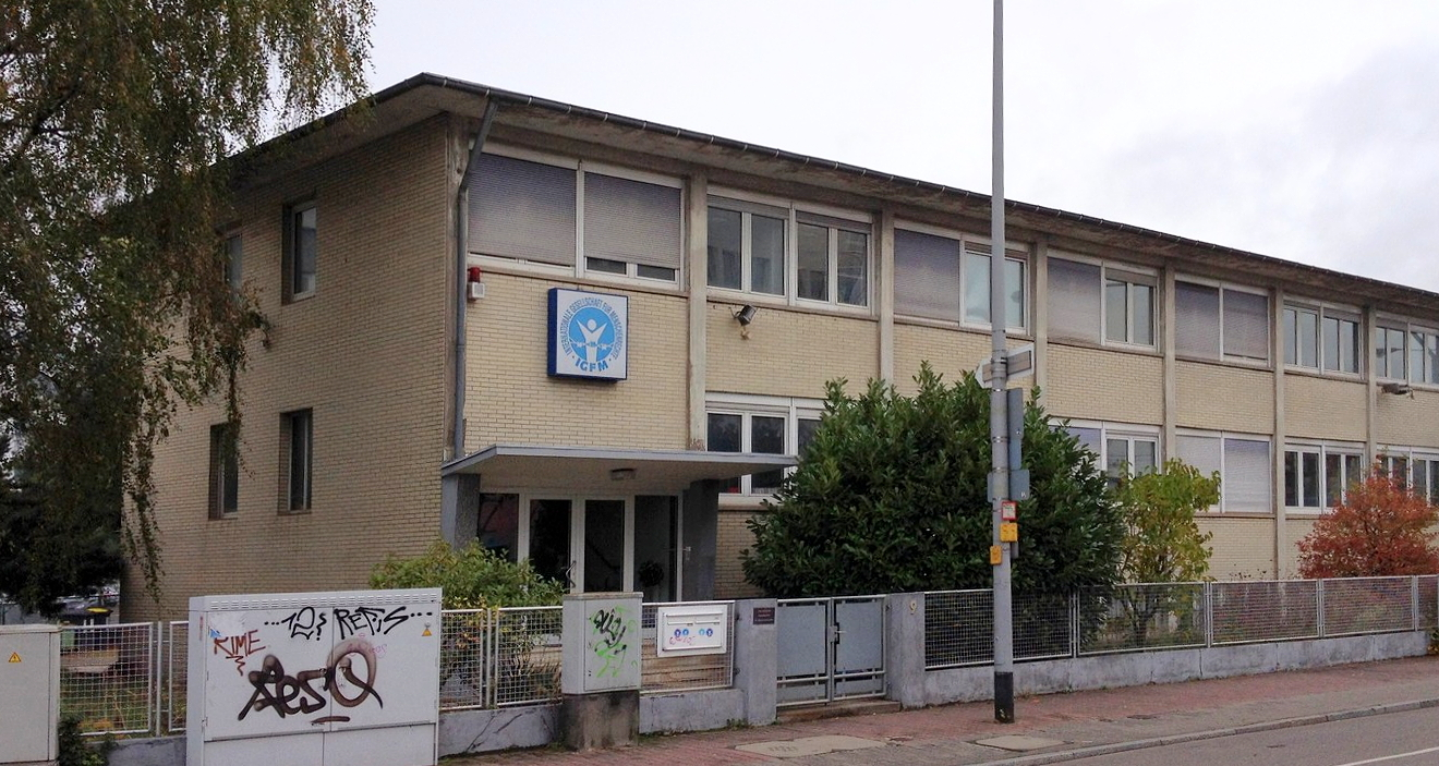 Geschäftsstelle der Internationalen Gesellschaft für Menschenrechte in Frankfurt am Main